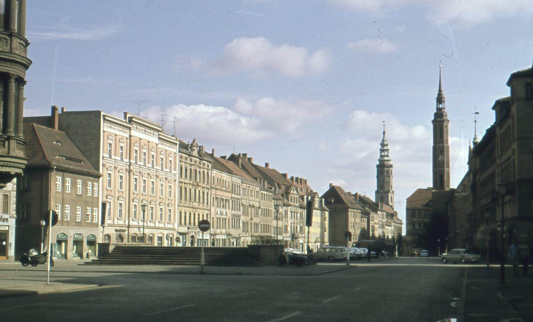 Der Görlitzer Obermarkt Anfang der 1970er Jahre noch mit der Tribüne auf der Westseite des Platzes.